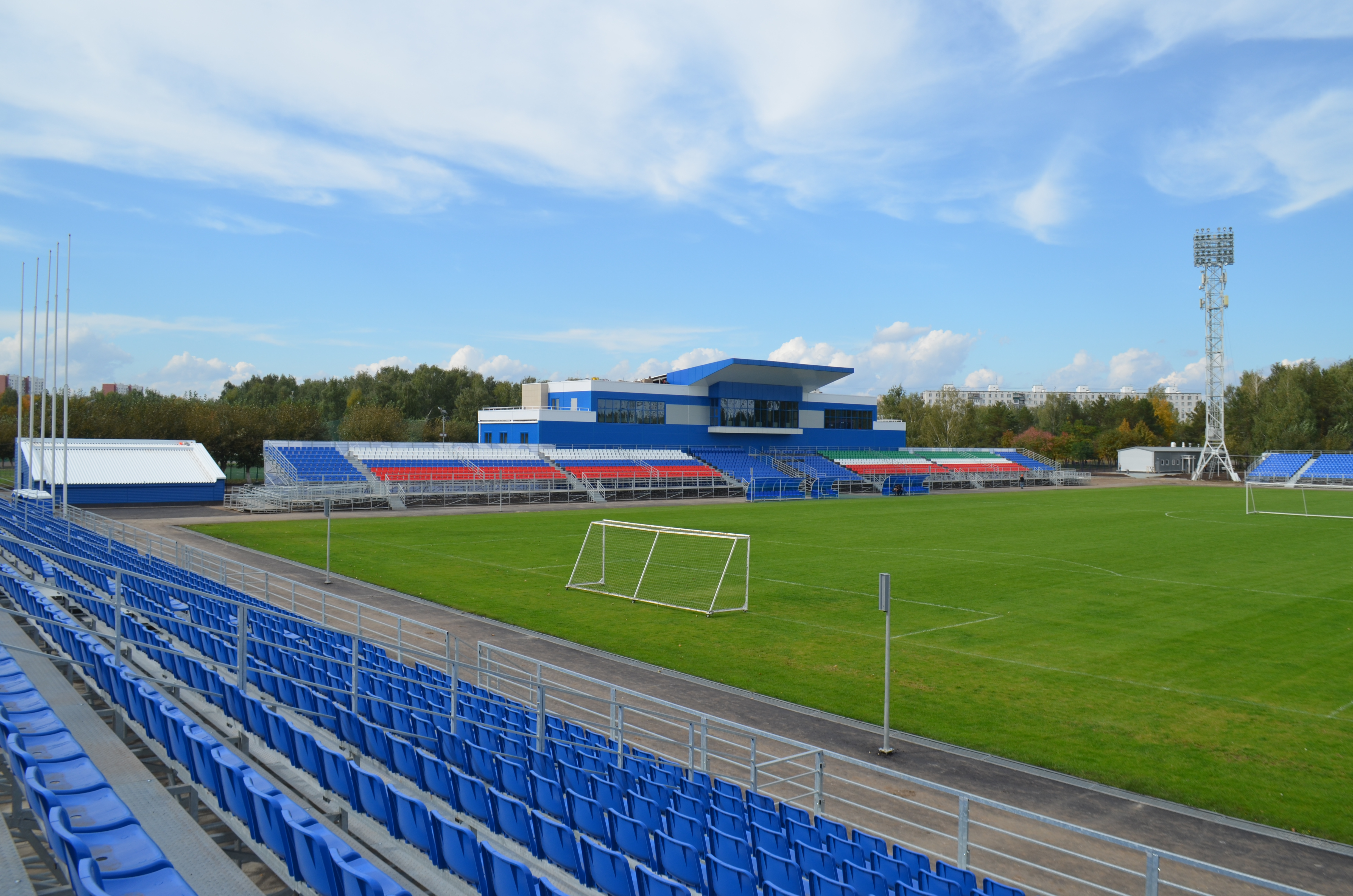 Центральная (западная) трибуна стадиона "КАМАЗ" в Набережных Челнах.